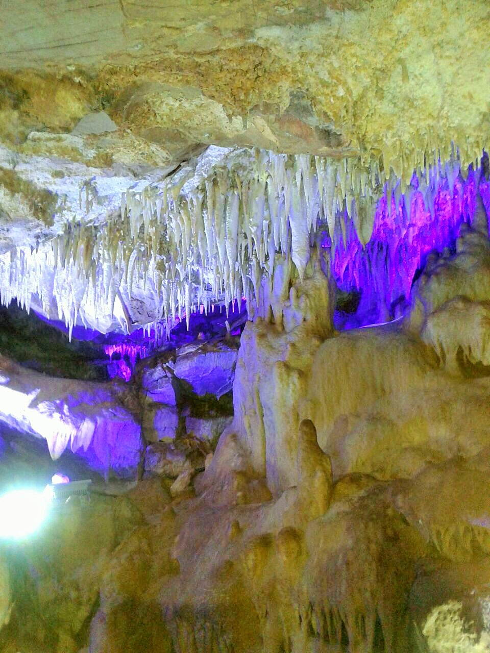 Cueva-3